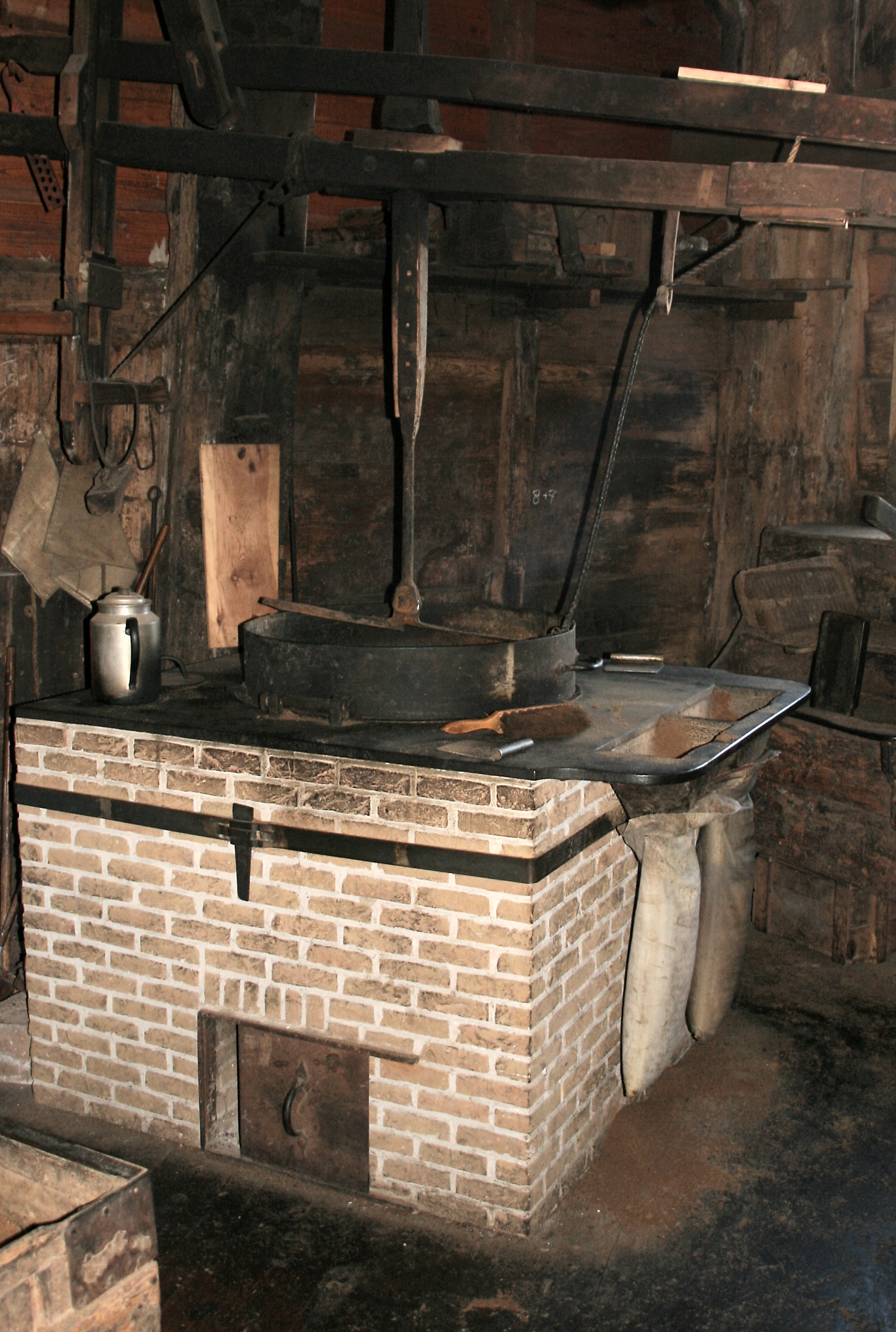 Koog aan de Zaan: oliemolen Het Pink: voorslagvuister (turfgestookt)